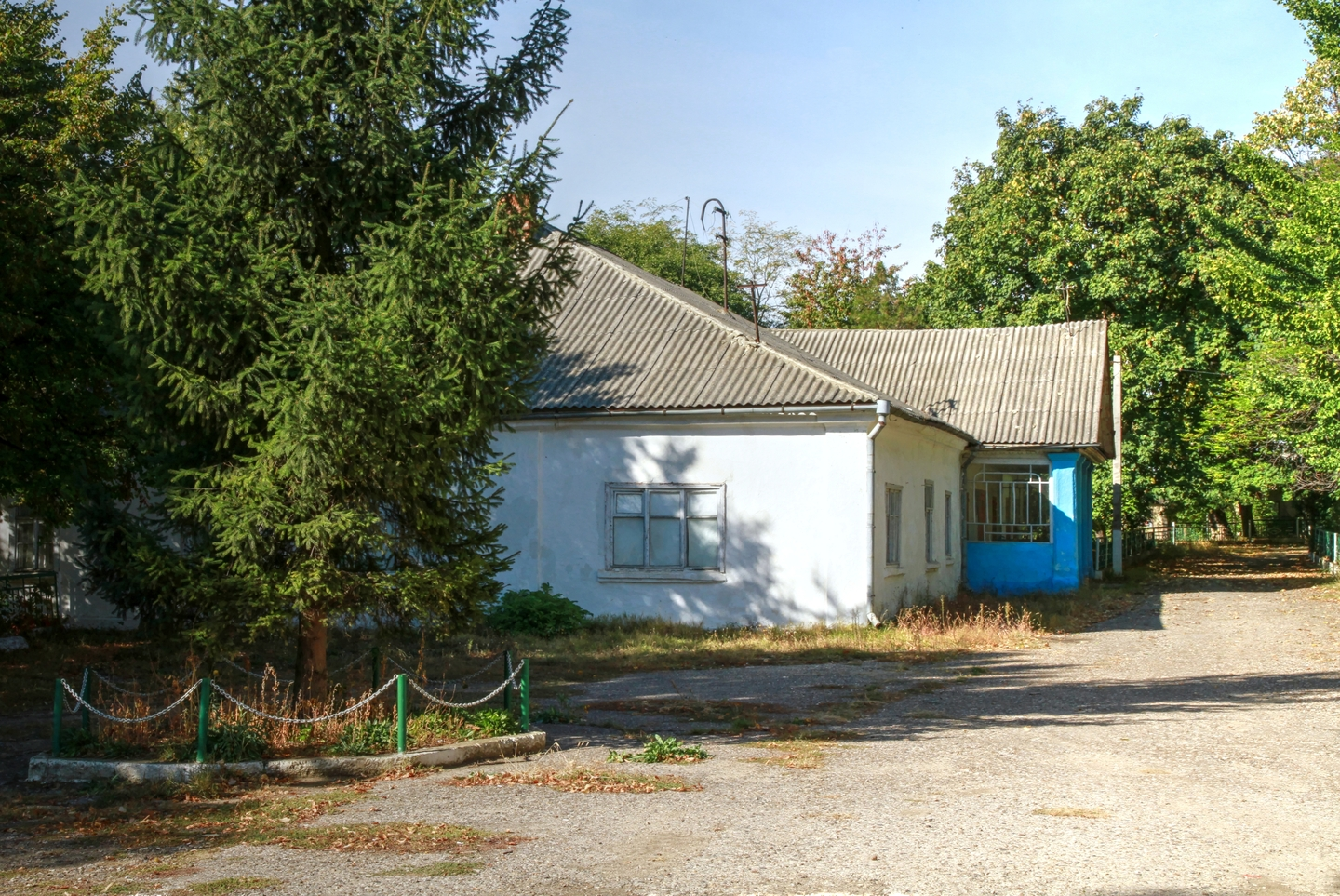 Милештский парк, монумент природы, находится в Ниспоренский район, с. Милешть (код MD-NS-map-016)